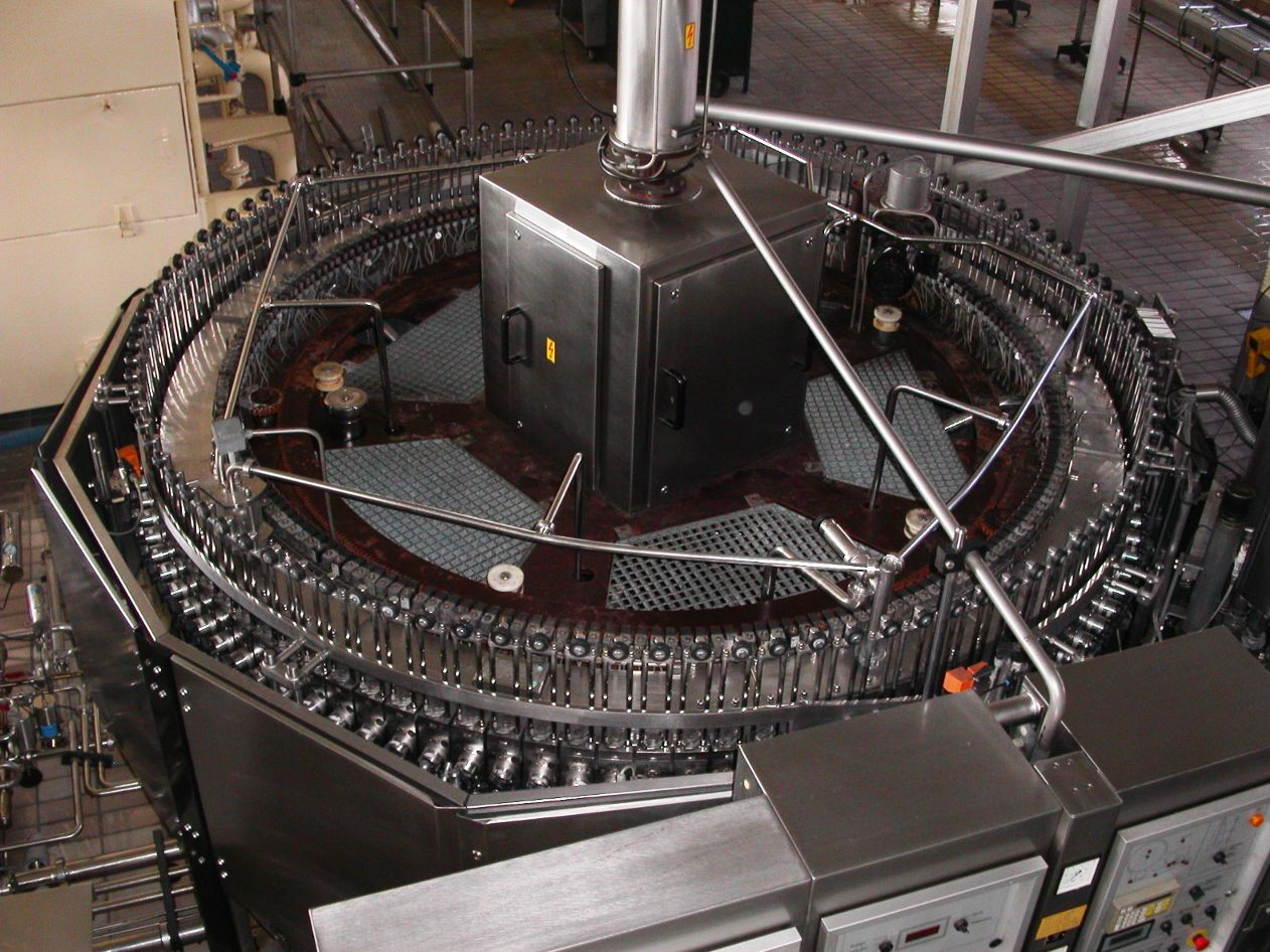 Flaschenfüller der Stauderbrauerei in Essen